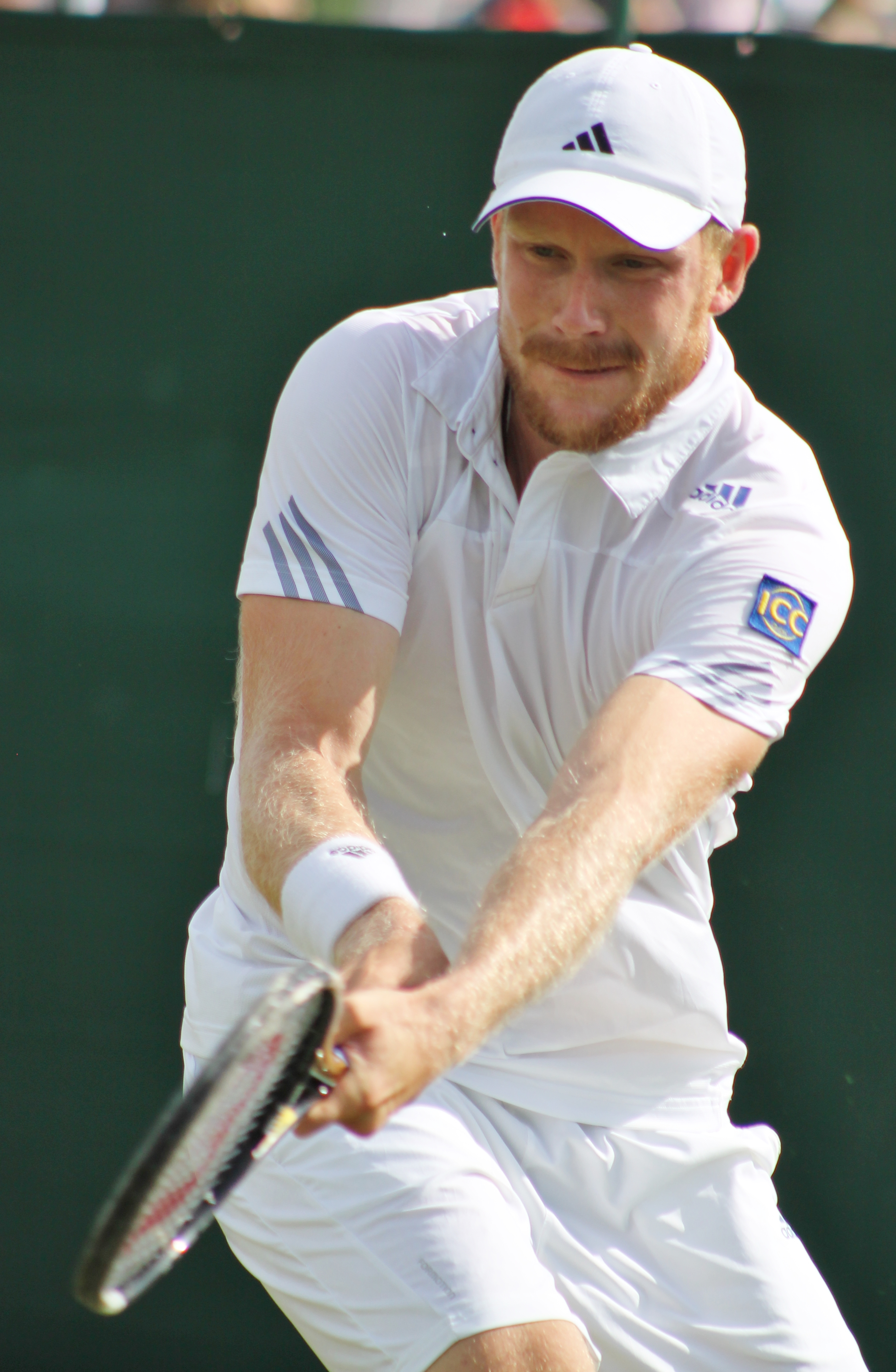 Bachinger WMQ14 (27)